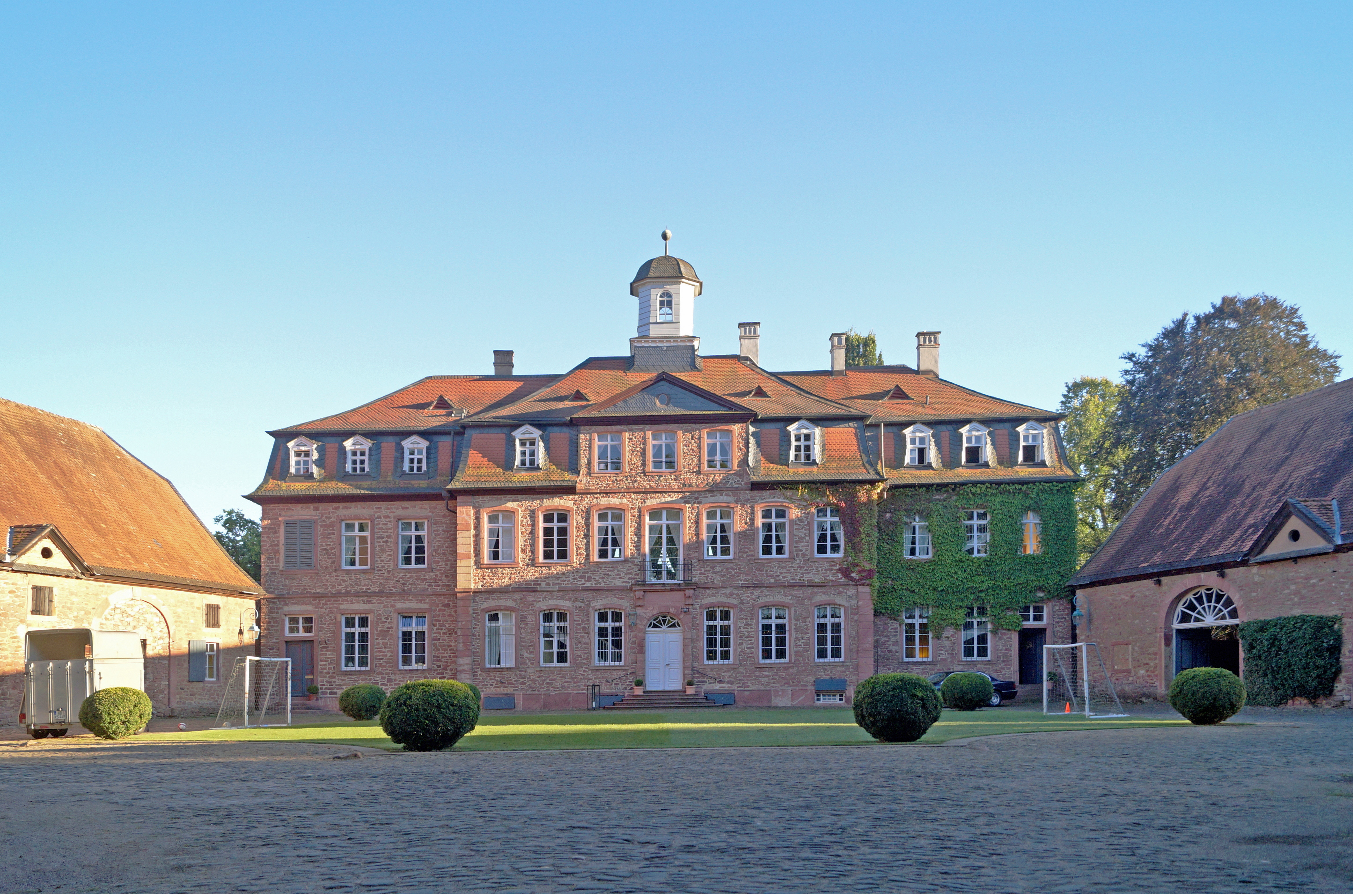 Schloss Emmerichshofen, Kahl am Main, Landkreis Aschaffenburg, Hauptgebäude von Norden